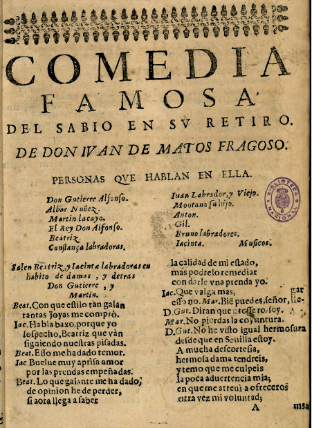 Íncipit de Juan de Matos Fragoso, «Del sabio en su retiro», en Parte treinta y tres de comedias nuevas, nunca impresas, escogidas de los mejores ingenios de España, Madrid, José Fernández de Buendía; a costa de Juan Martín Merinero, 1670, págs. 1-43. Edición digital: Alicante, Biblioteca Virtual Miguel de Cervantes; reproducción a partir de la ed. facsímil en línea de Madrid, Biblioteca Nacional, 2010. Sig. R/22686